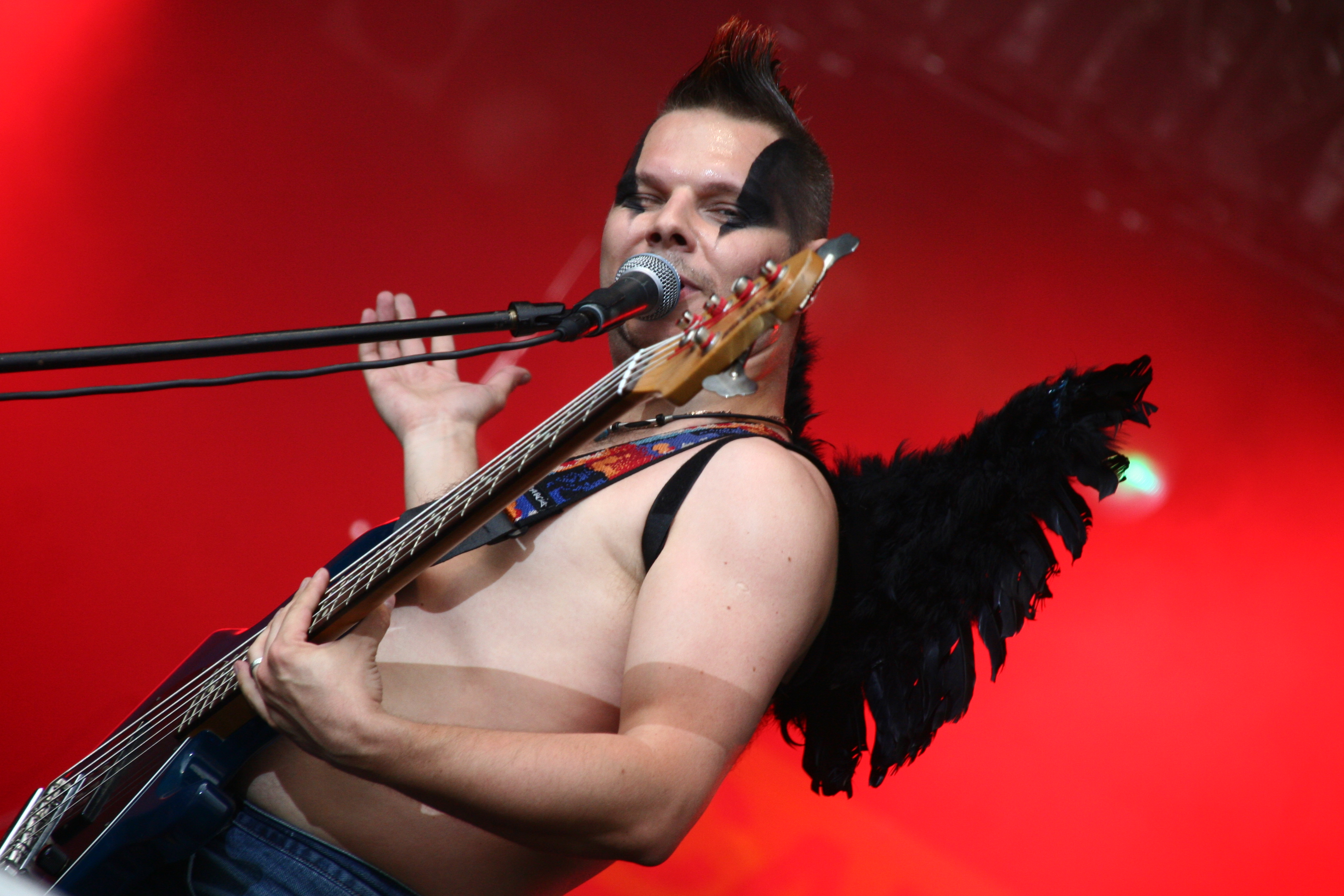 Алексей Мурашов, группа "Скворцы Степанова" на фестивале "Окна Открой 2009"